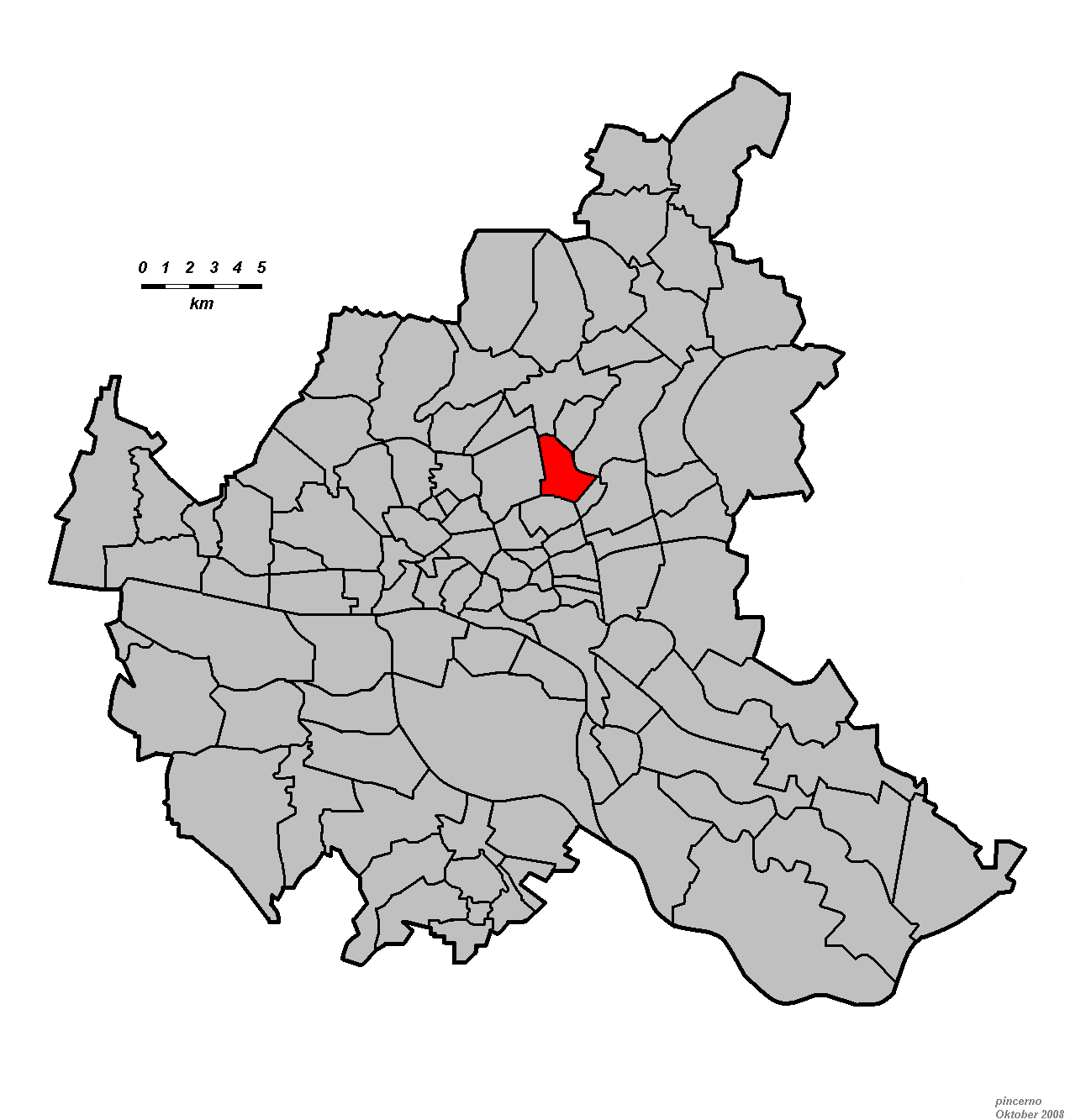 Hamburg: Stadtteil Hamburg-Barmbek-Nord